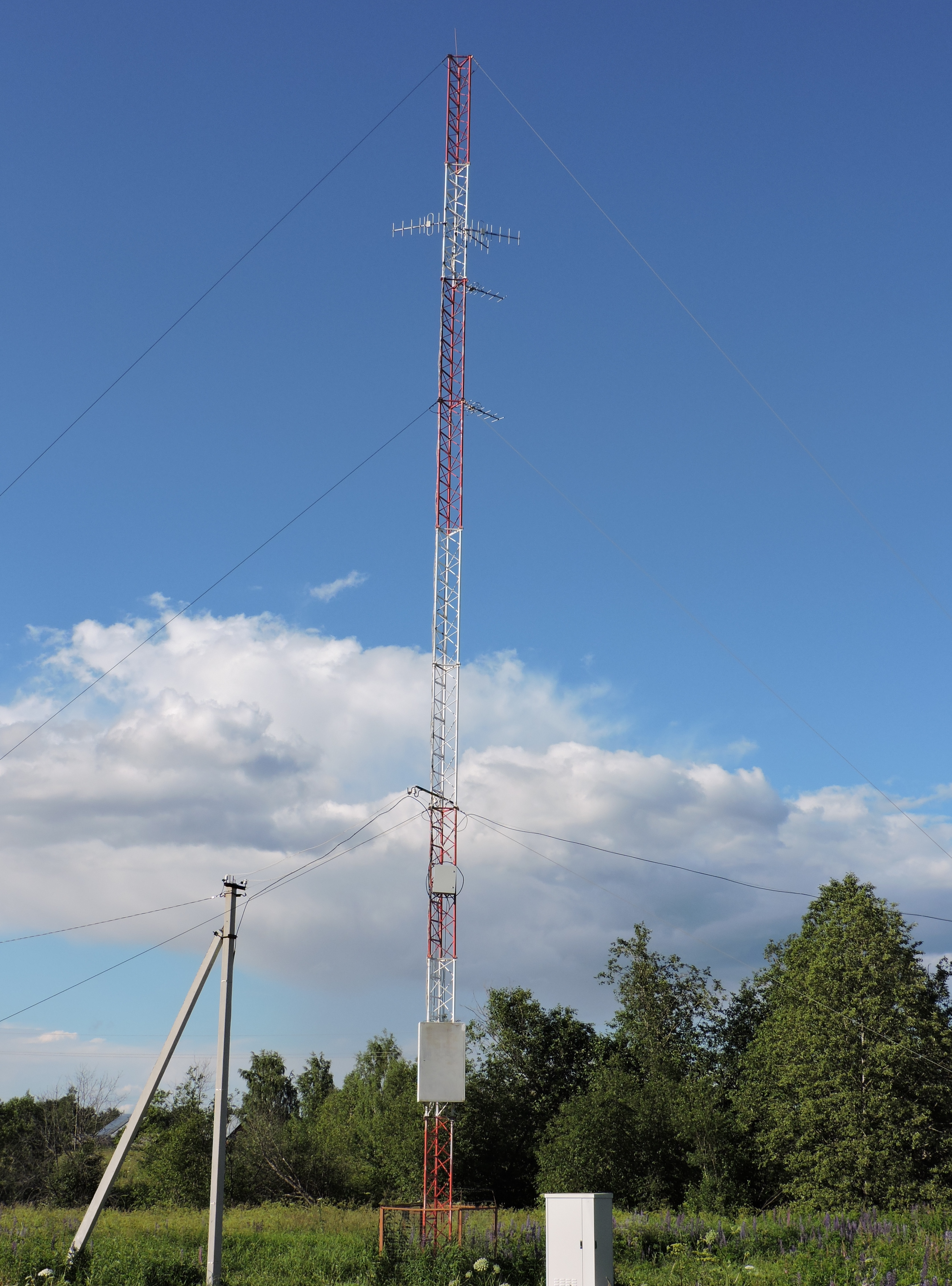 Антенно-мачтовое сооружение